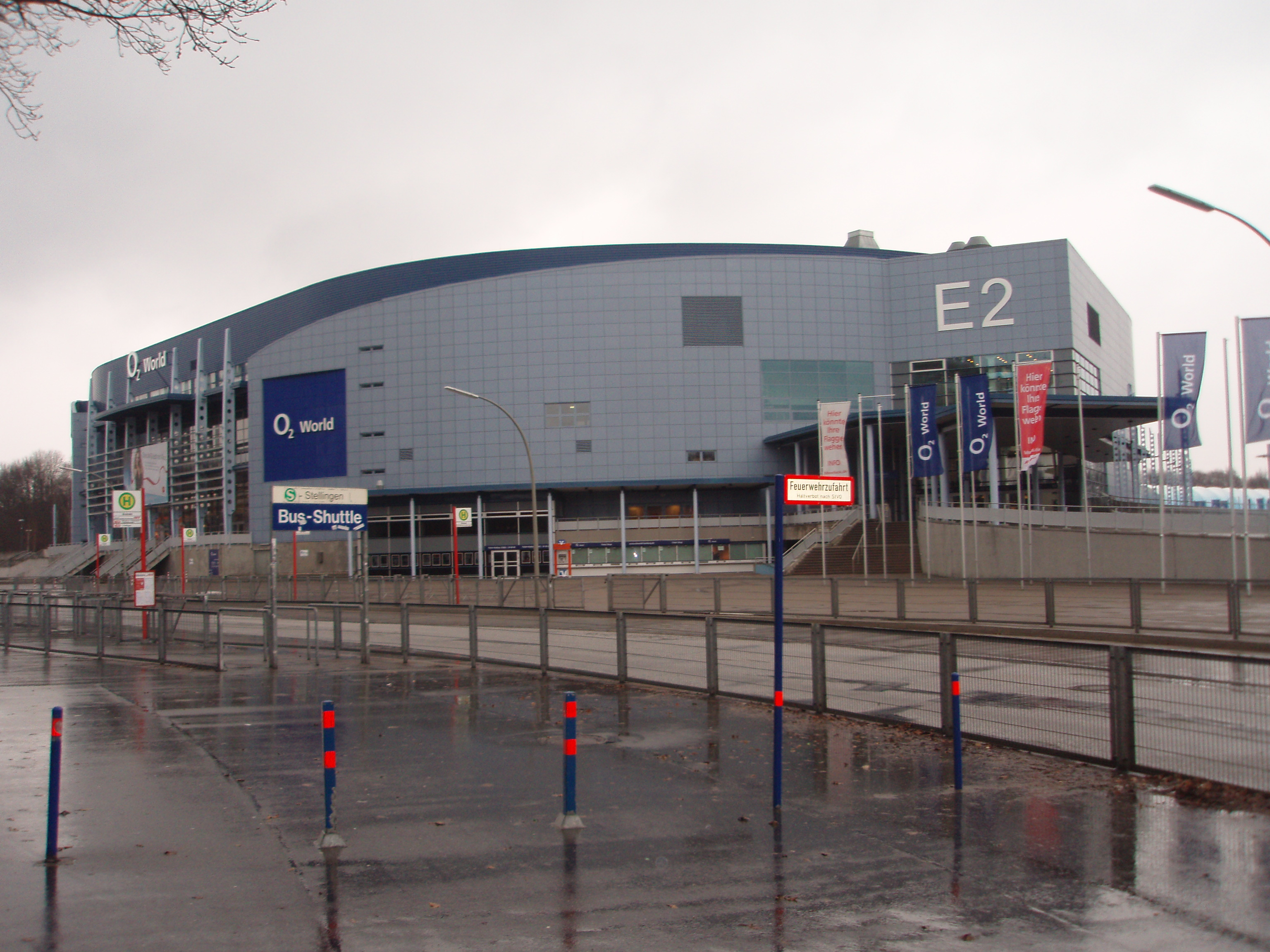 02 World